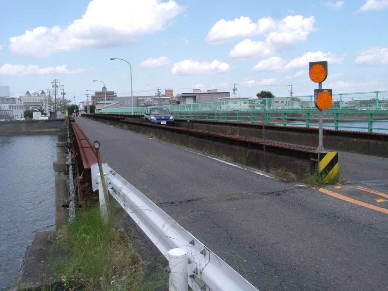 近鉄道路岩田川橋梁